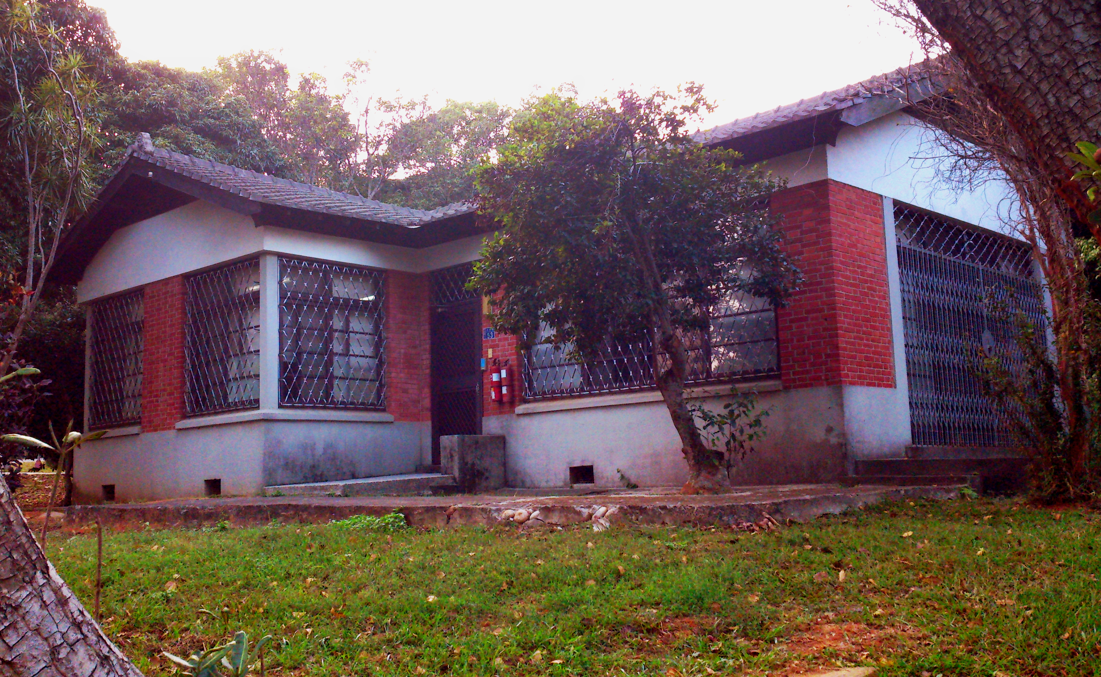 中文（台灣）: 東海大學教職員宿舍